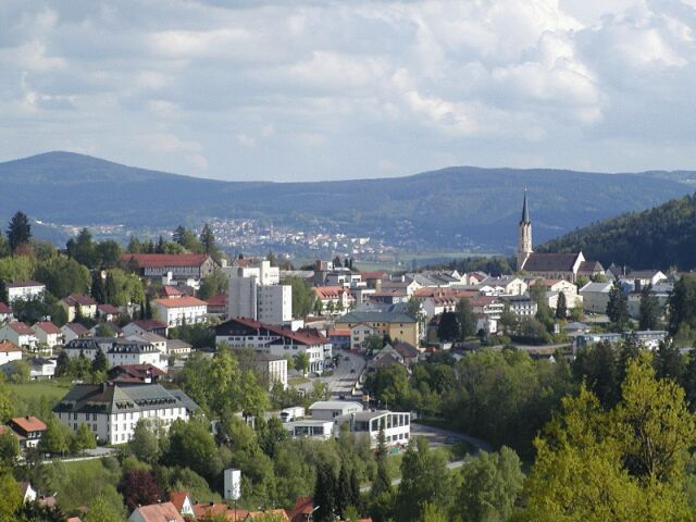 Blick vom Steinberg auf Freyung, im Hintergrund Waldkirchen.